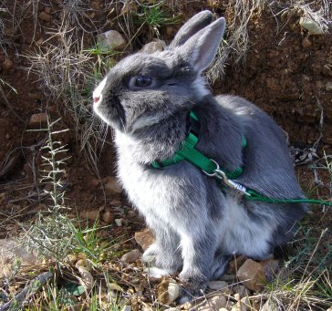 Jeune lapin nain agé de 8 mois, poil gris, assis et tenu en corde